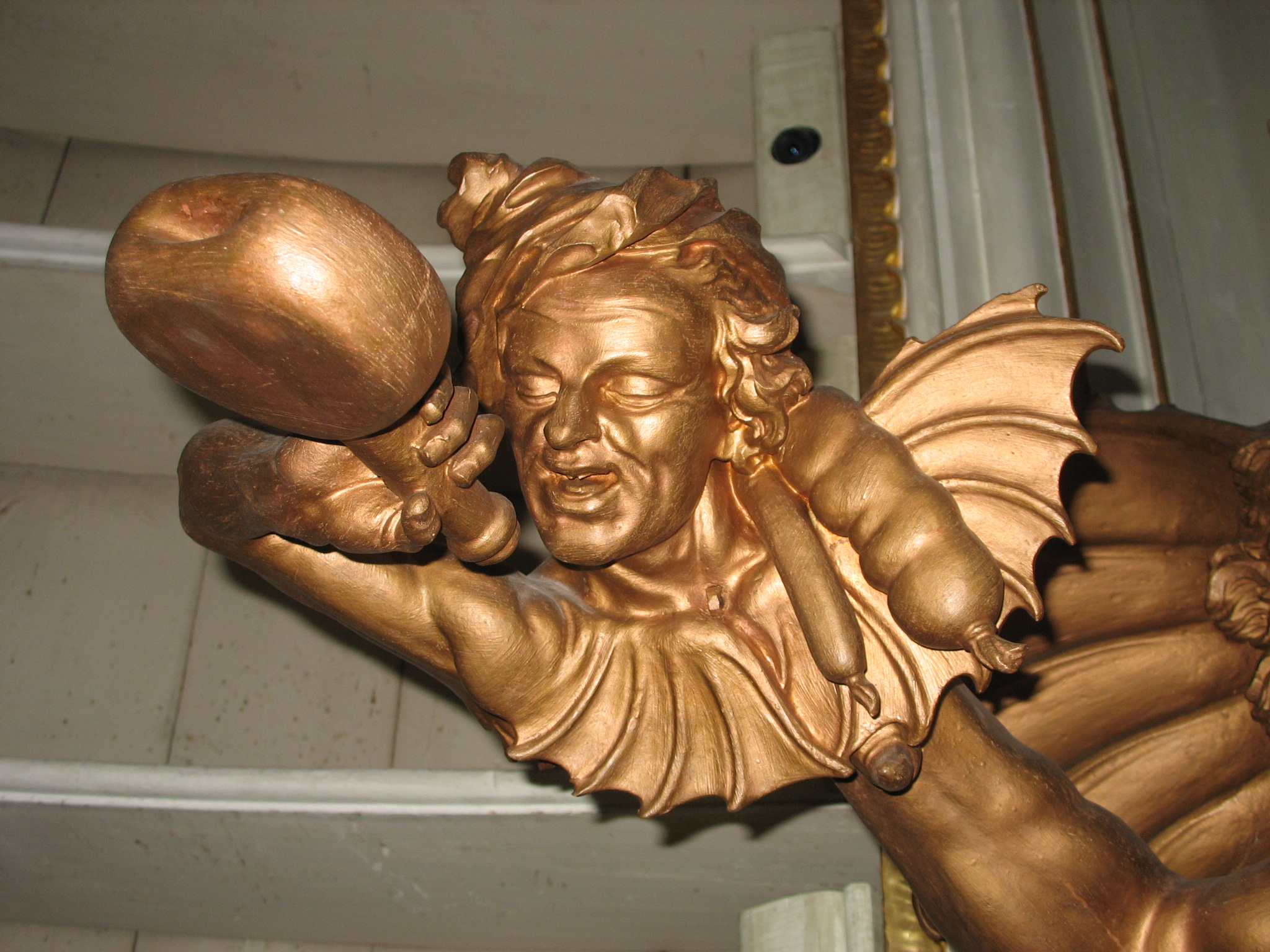 Josef Stammel (1695-1765): Die vier letzten Dinge: Hölle (Detail: "Völlerei/Trunksucht"). Stift Admont, Stiftsbibliothek